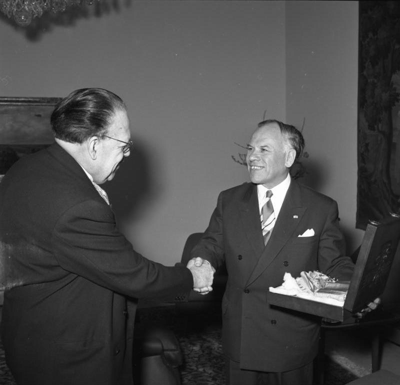 Bundestagspräsident Dr. Gerstenmaier erhält Orden vom mexikanischen Botschafter Alfonso Guerra